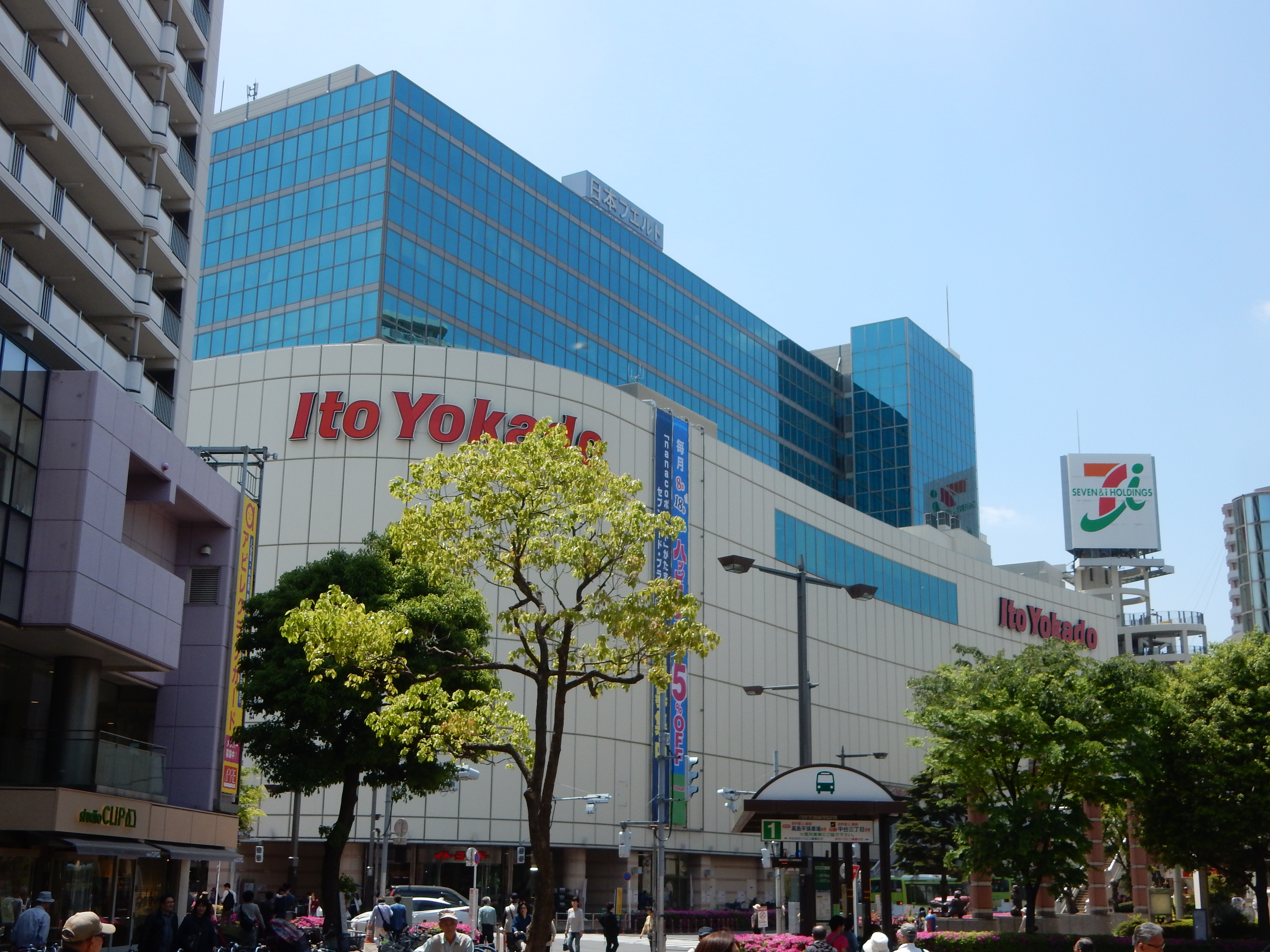 日本フエルト本社。建物の低層階は、イトーヨーカドー赤羽店。東京都北区赤羽西1丁目7番1号